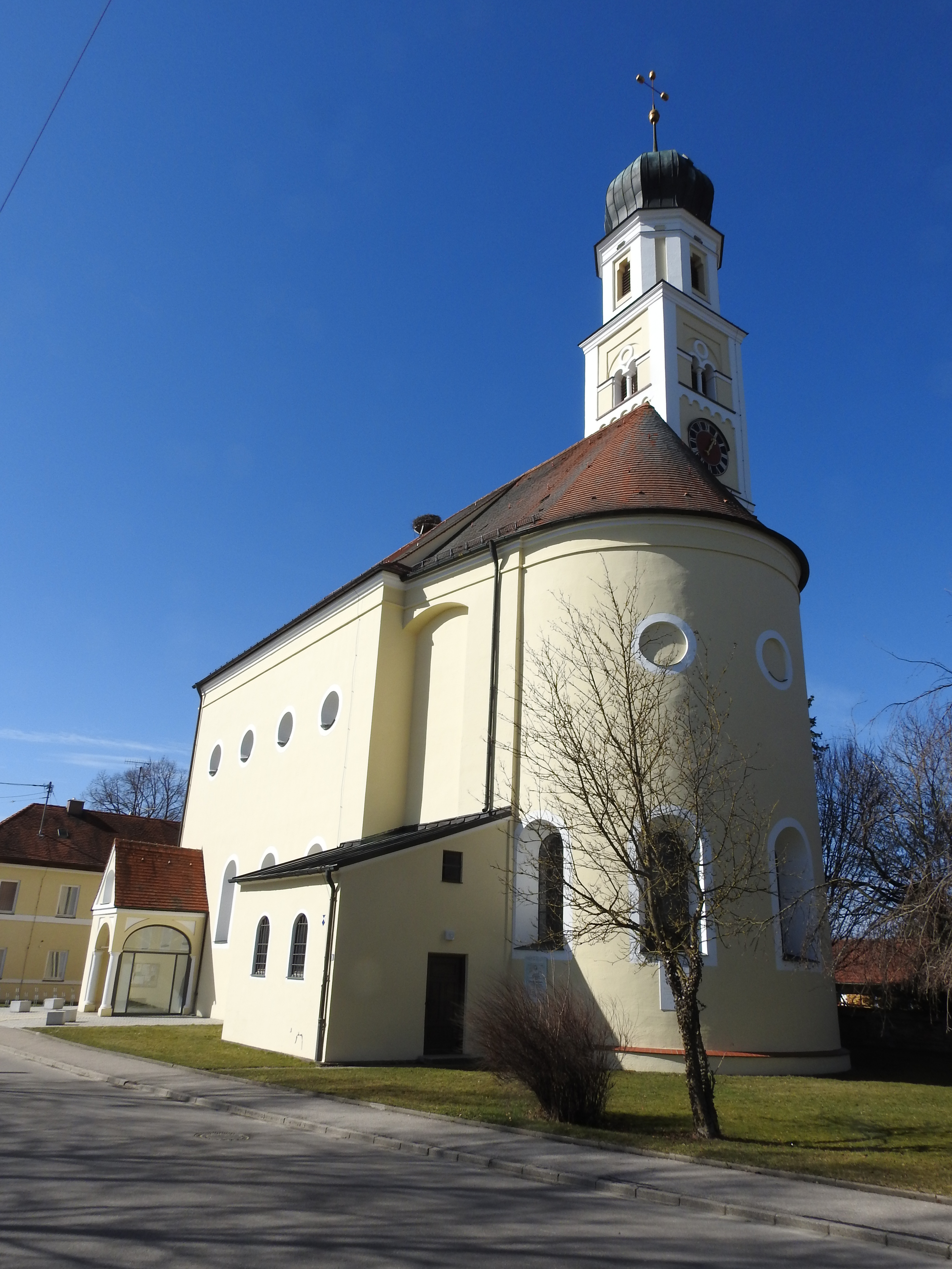 Kirche in Gennach, Langerringen